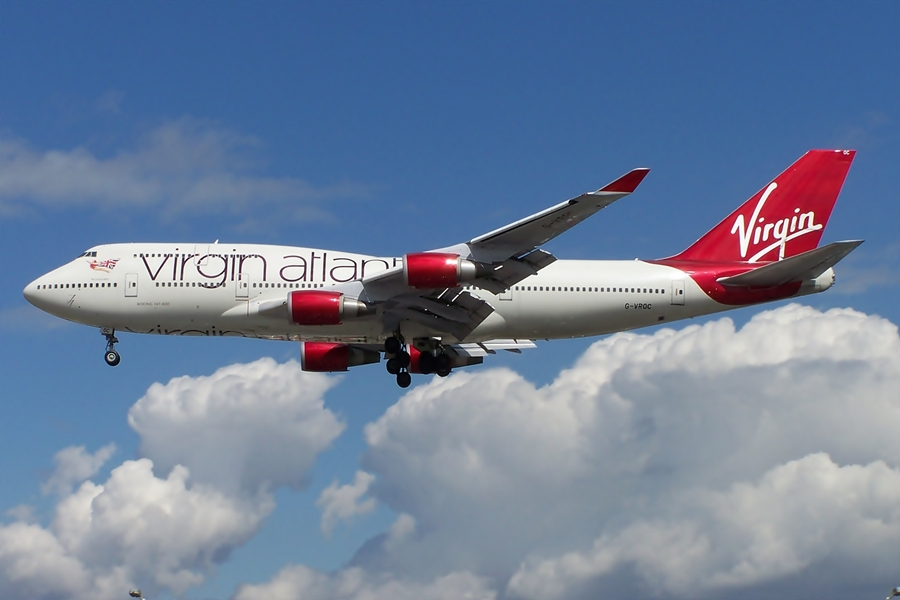 G-VROC Boeing 747 Virgin